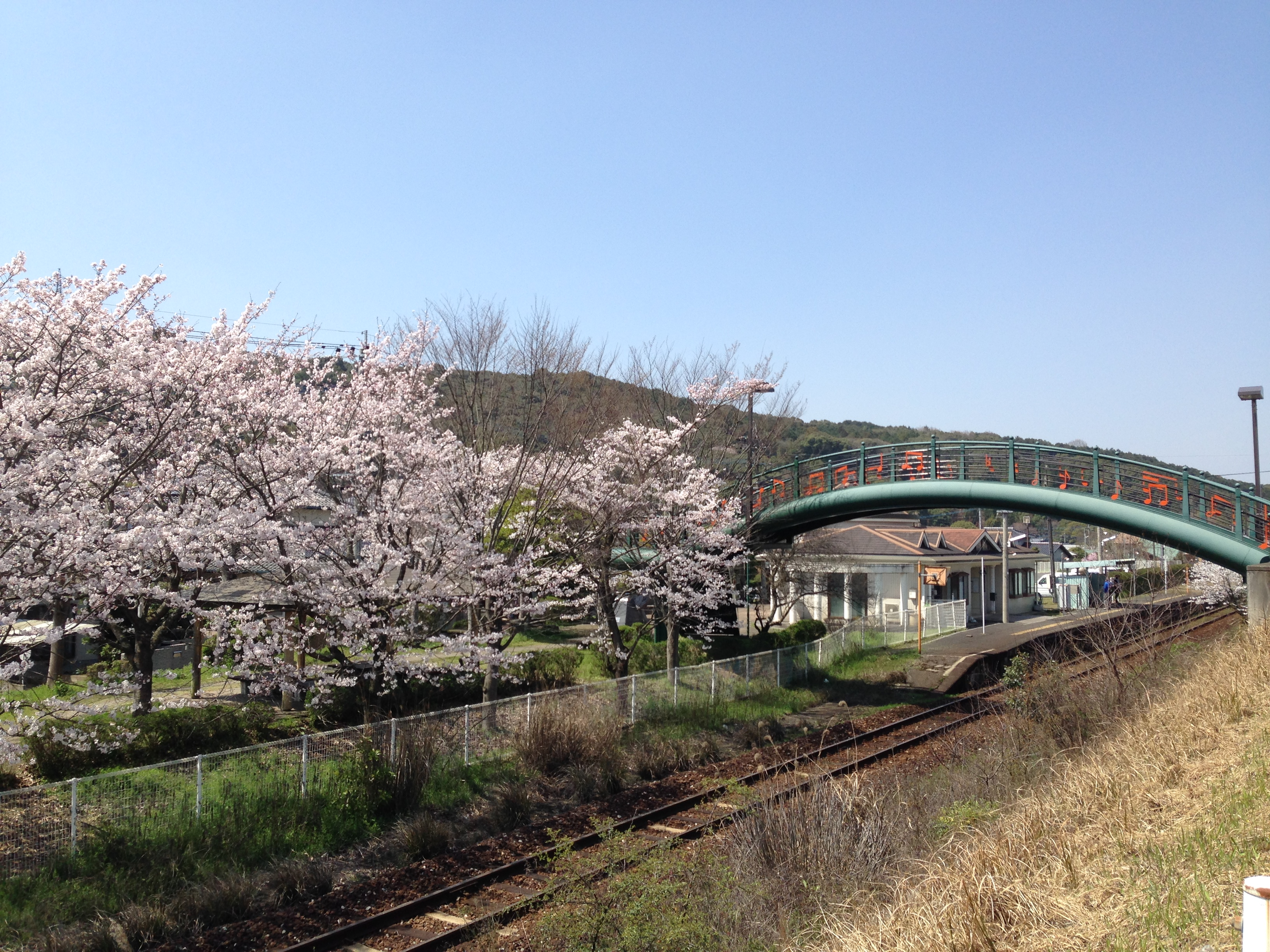 西添田駅のホームと桜